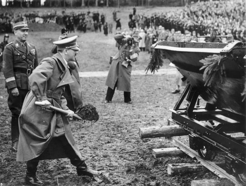 IV. 1938. Der Führer beim ersten Spatenstich zur ersten Autobahn Österreichs am Walser Berg bei Salzburg. UBz: der Führer vollzieht den ersten Spatenstich. Hinter ihm der Generalinspekteur für das deutsche Straßenwesen Dr. Todt. Hs. (Scherl-Text)